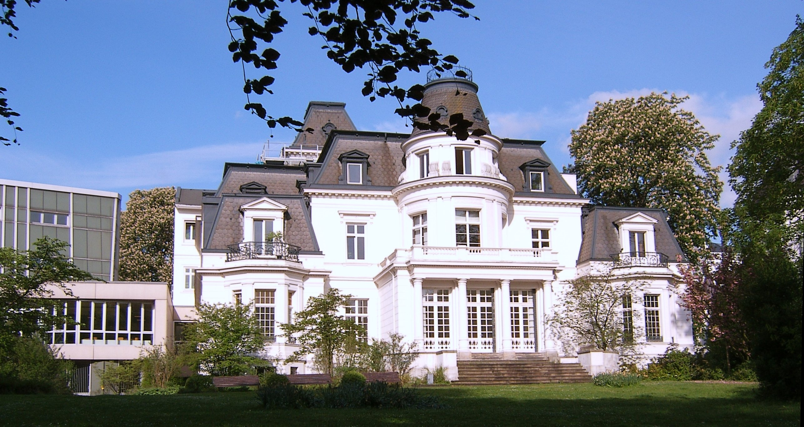 Hamburg, Harvestehude, Budge-Palais. Fotograf: selbst Datum: 15.5.2006